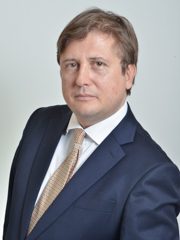 Pierpaolo Sileri